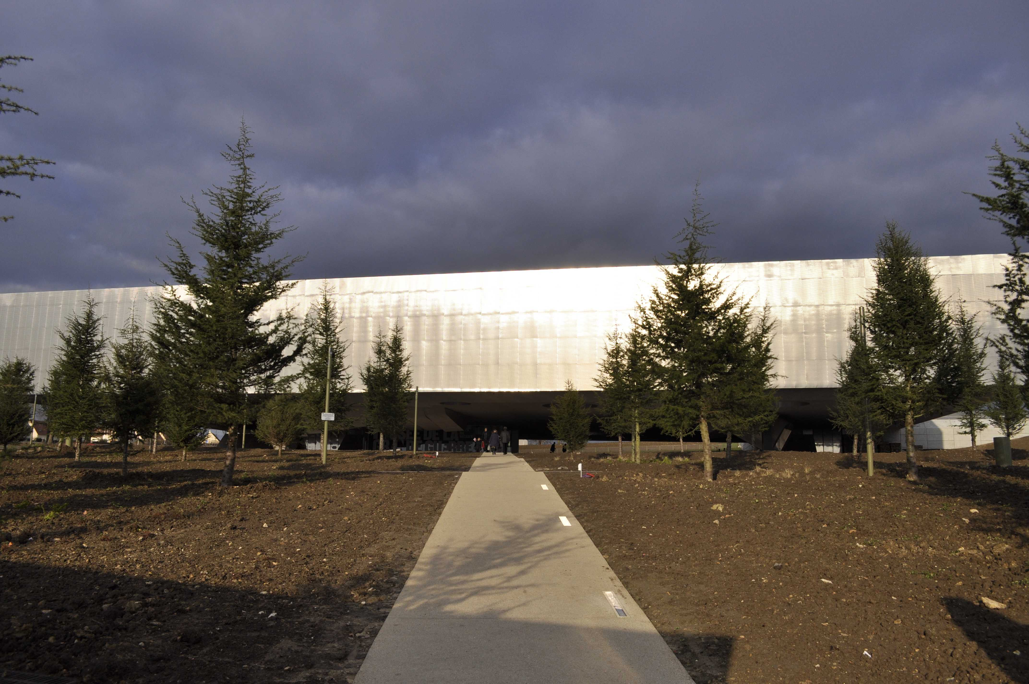 Musée de la Grande Guerre du Pays de Meaux : chemin principal.